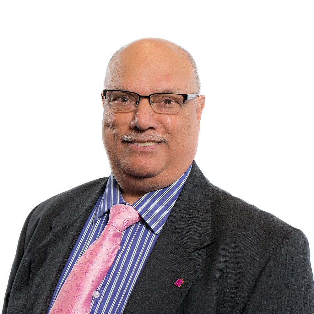 Mohammad Asghar